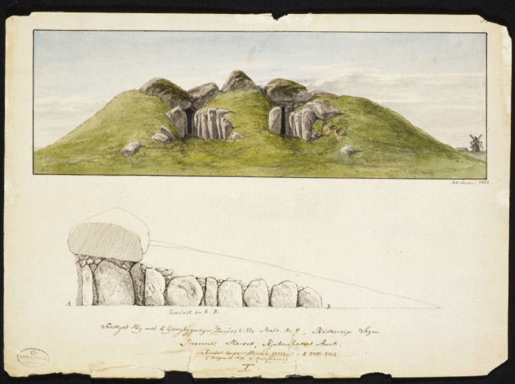 Akvarel af A.P. Madsen 1883. Dobbeltjættestue samt tegning af tværsnit af det ene kammer i jættestuen.